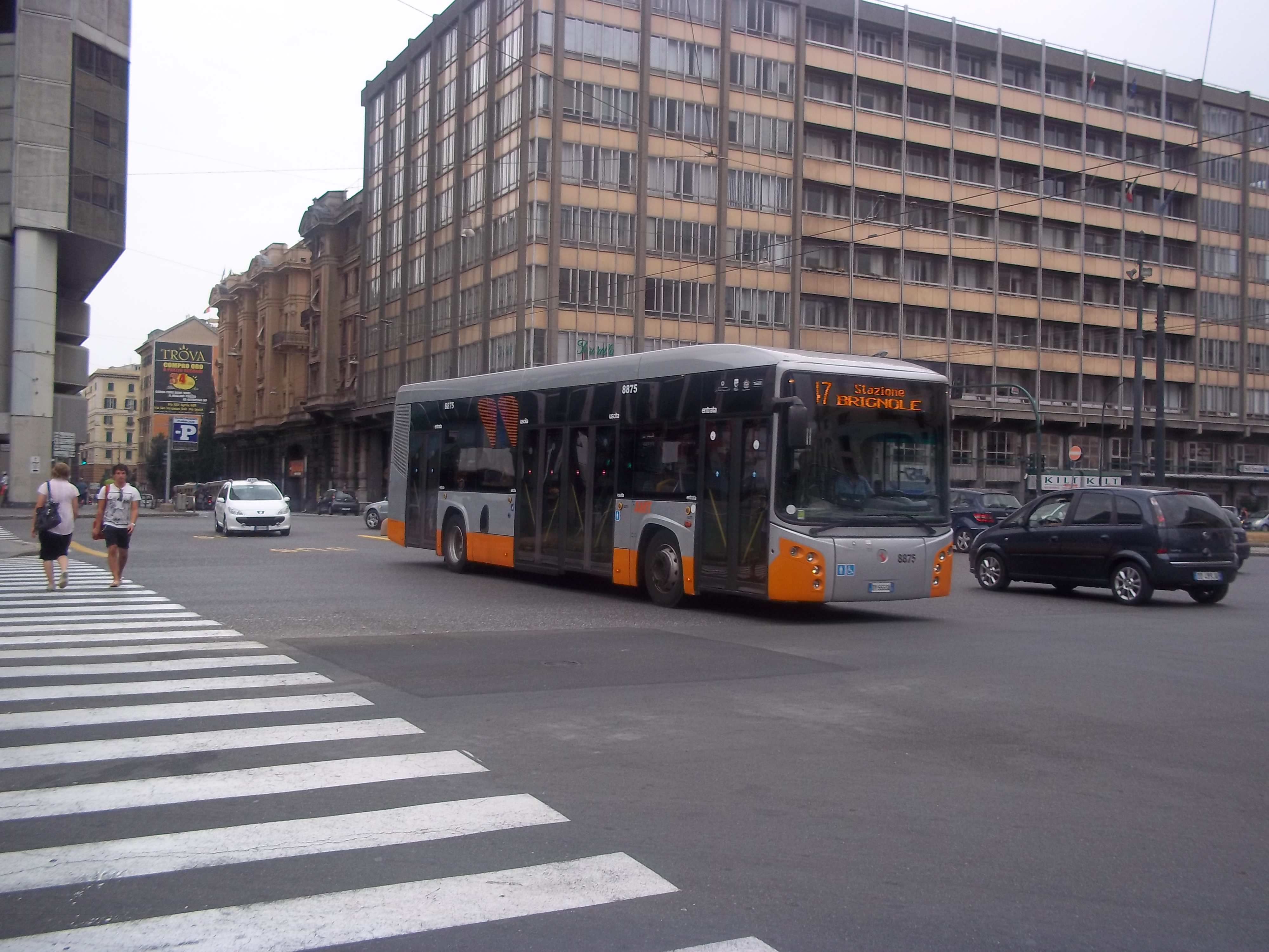 BMB Avancity Plus dell' AMT Genova